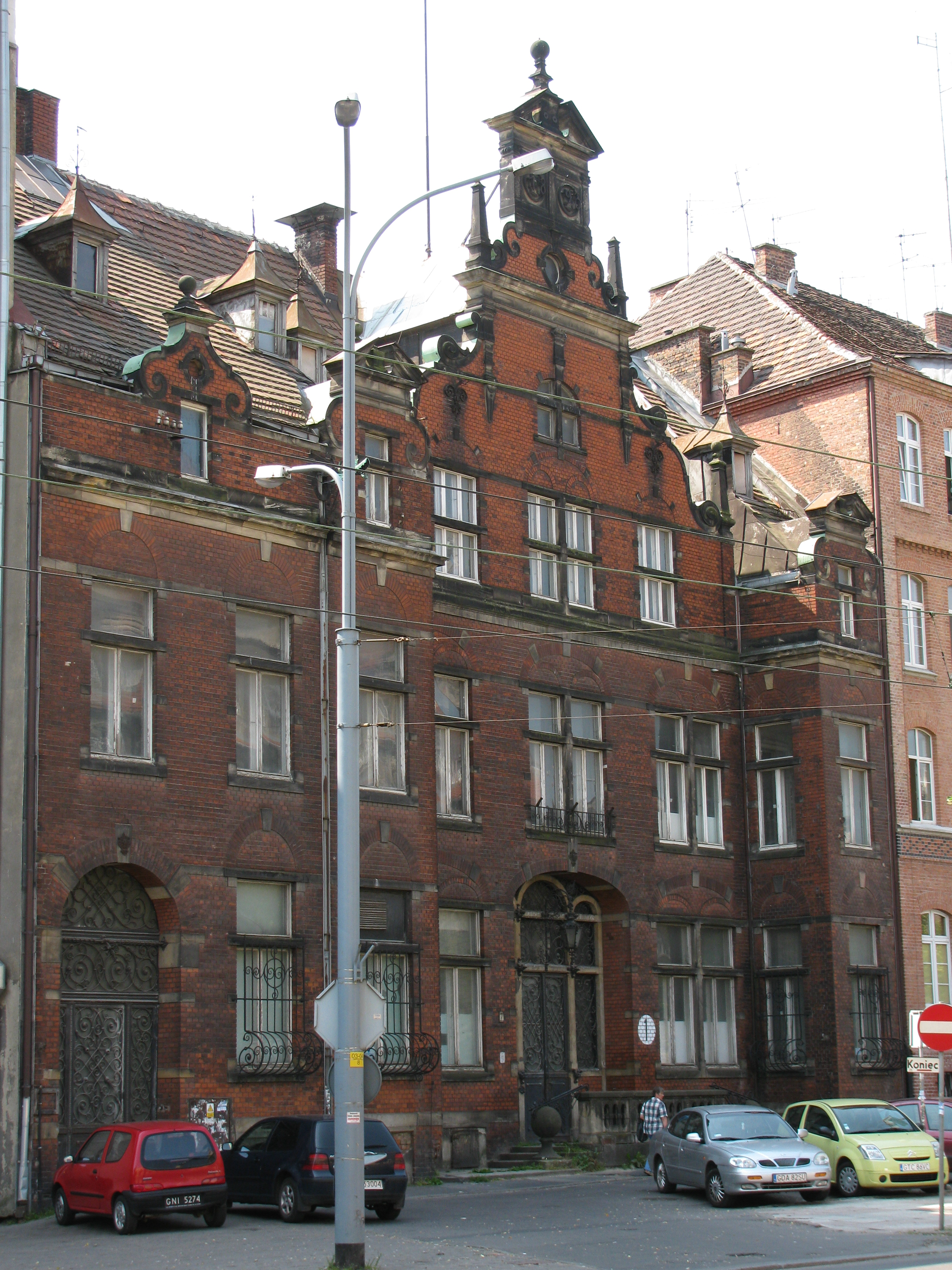 Ul. Nowe Ogrody 7 w Gdańsku. Dom Tornwalda - zabytkowa kamienica z XIX w. - budynek zbudowany w latach 1892-93 dla laryngologa Gustawa Ludwika Tornwalda, w latach 1914-18 Królewsko-Pruska Komendantura Twierdzy Gdańsk. W okresie Wolnego Miasta budynek należał do Polski - mieściły się w nim kolejno Klub Polski, Naczelny Inspektorat Ceł i Polski Klub Morski. W okresie II wojny światowej komendantura Wehrmachtu. Po wojnie przekształcony w internat, w 1960 włączony do zespołu szpitala im. Kopernika. W 2006 roku budynek został przekazany miastu, od 2007 w rejestrze zabytków.